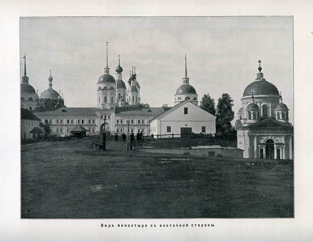 Вид Саровского монастыря с восточной стороны